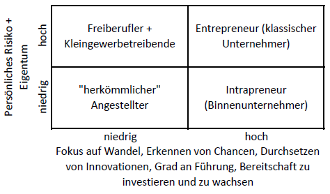 Differenzierung anhand der zwei wichtigsten Kriterien des Unternehmertums (eigene Darstellung in Anlehnung an: Kaschny, Martin / Nolden, Matthias / Schreuder, Siegfried: Innovationsmanagement im Mittelstand- Strategien, Implementierung, Praxisbeispiele. Springer Gabler, Wiesbaden 2015, S. 34)